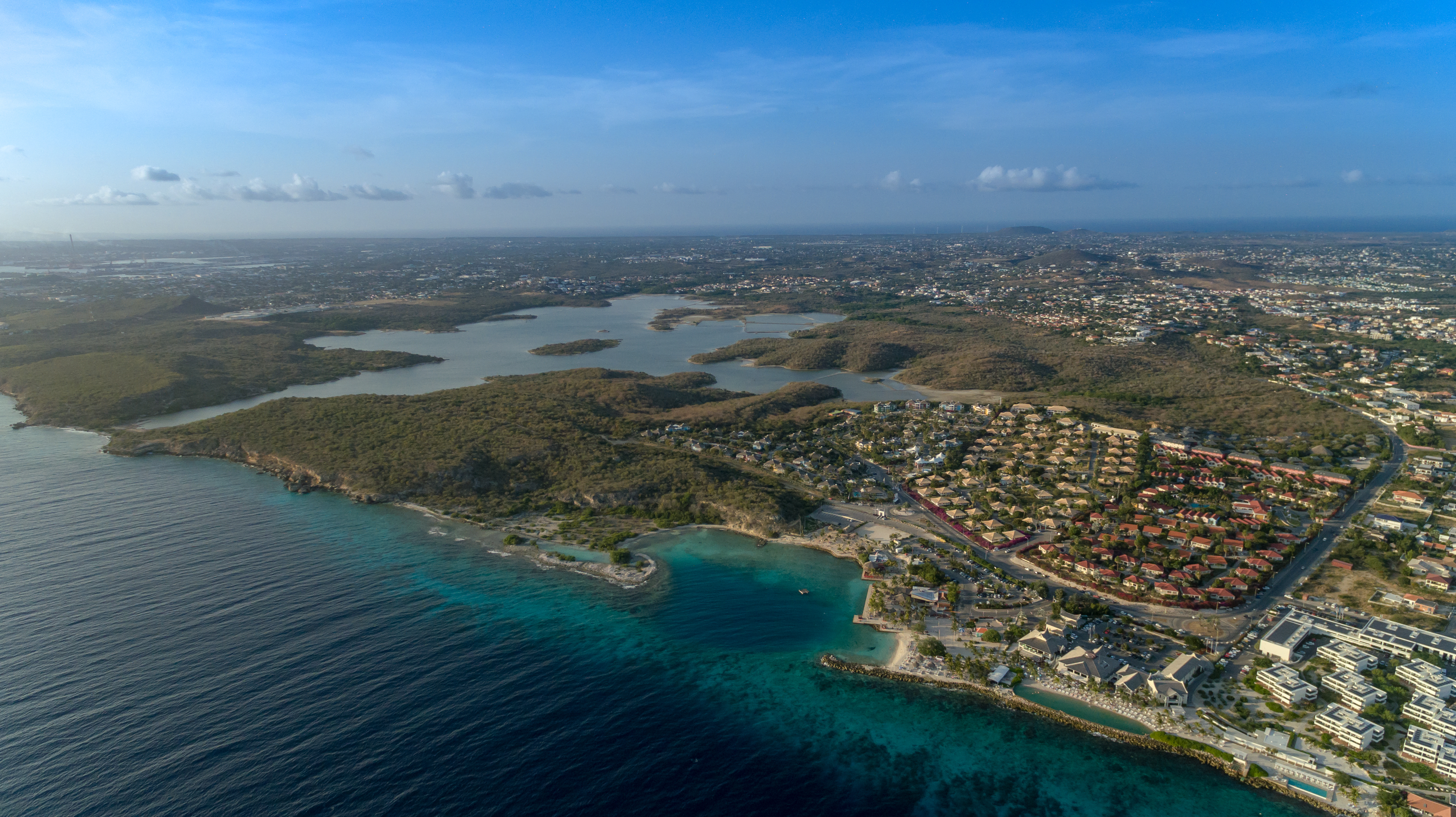 Curacao Jan Thiel Curacao